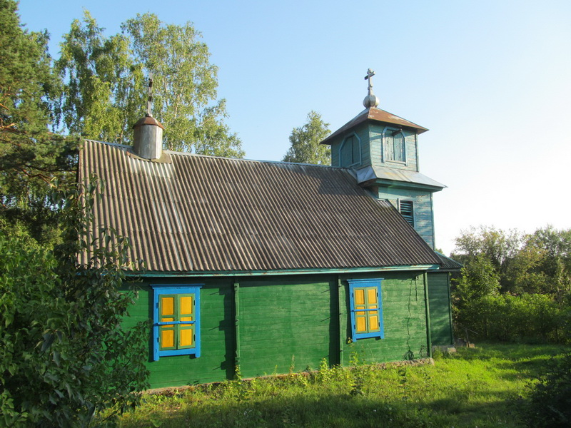 Мікалаюнцы. Свята-Мікалаеўская царква